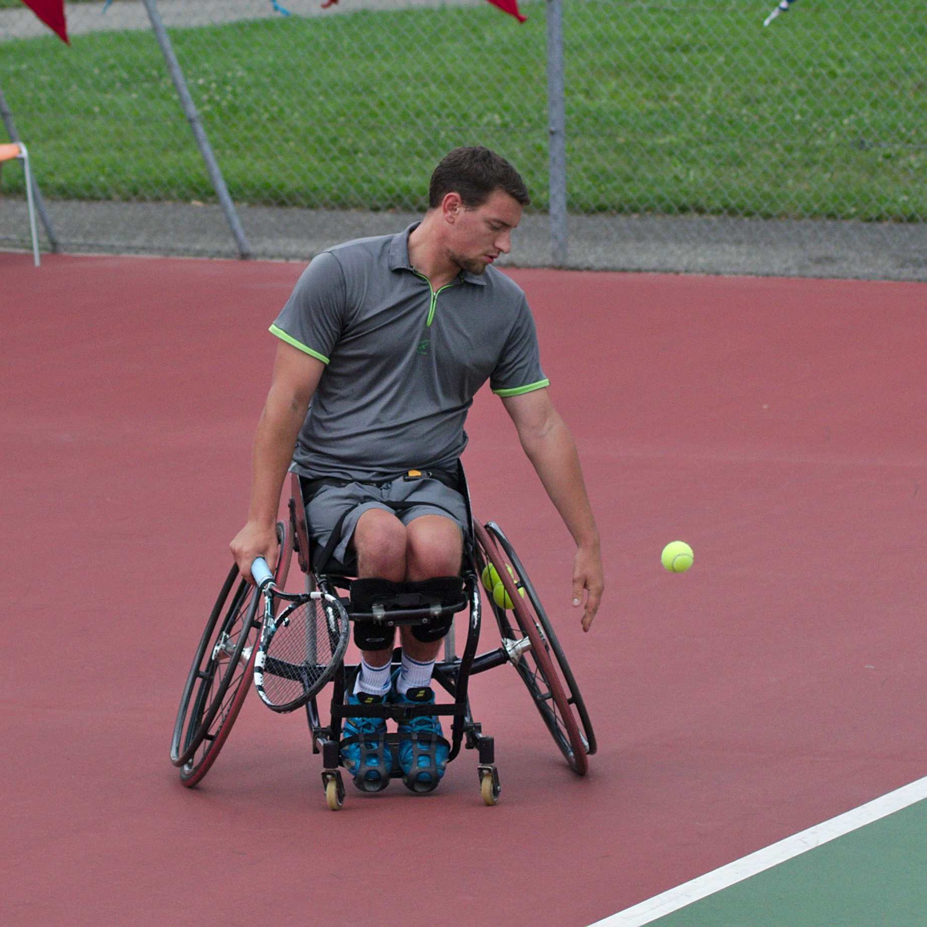 Swiss Open Geneva - 20140712 - Semi final Men - J. Gerard vs S. Houdet